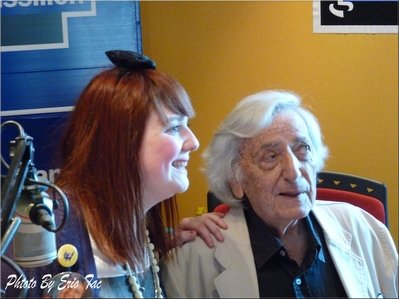 Luce en compagnie de Jordi Barre.